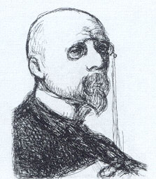 Jakob Smits, zelfportret. Ets. Jakob Smitsmuseum, Mol, gestorven in 1928